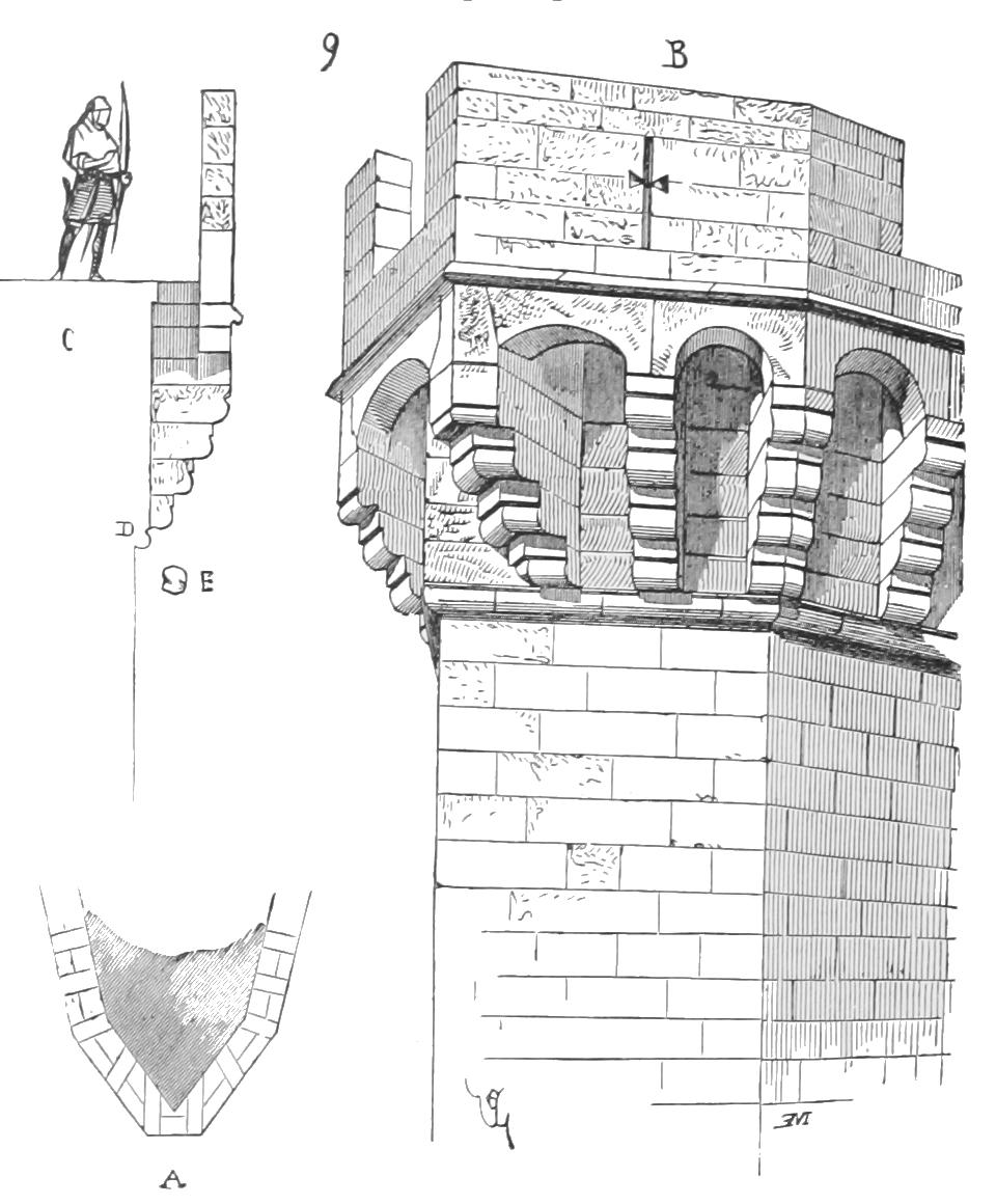 «En plan (9), les consoles de ces mâchicoulis biaisent pour arriver à former deux lignes parallèles à la pointe, ainsi que l'indique le tracé A. Le bec est donc dominé par un créneau perpendiculaire à son axe et par deux trous de mâchicoulis triangulaires; il est défendu. Nous en présentons en B la vue perspective. Le profil C est pris sur l'axe d'une arcature de mâchicoulis. On remarquera la saillie D, ménagée en contre-bas des consoles, et qui était destinée à empêcher les projectiles E, tombant par les trous, de ricocher le long des aspérités des parements, ce qui les eût fait dévier de leur ligne verticale de chute; or, la ligne verticale de chute était calculée avec grand soin par les constructeurs militaires, elle venait toujours rencontrer un talus qui faisait décrire à ces projectiles une certaine parabole en raison de leur poids et de la hauteur de la muraille.»